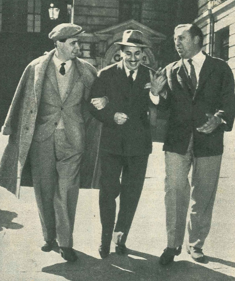 Gorni Kramer tra Garinei e Giovannini nel 1958; foto di autore anonimo scattata a Roma